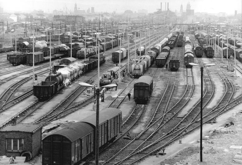 Dresden, Güterbahnhof ADN-ZB 4-6-1980 Dresden: Zum „Tag des Eisenbahners“-Unmittelbar vor ihrem Ehrentag am 8. Juni können die rund 30.000 Werktätigen des Reichsbahn-Direktionsbezirkes Dresden einen vorbildliche Erfüllung der Transportleistungen abrechnen. Anteil am erreichten Leistungsanstieg in den ersten vier Monaten dieses Jahres haben Eisenbahner des größten Güterbahnhofs der DDR in Dresden-Friedrichstadt. 4.500 Wagen werden hier täglich abgefertigt.